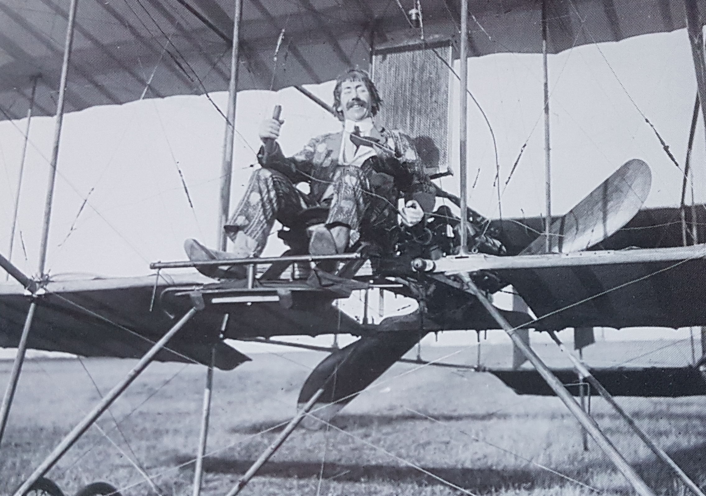 Victor Arfvidsson i filmen Kolingens galoscher 1911